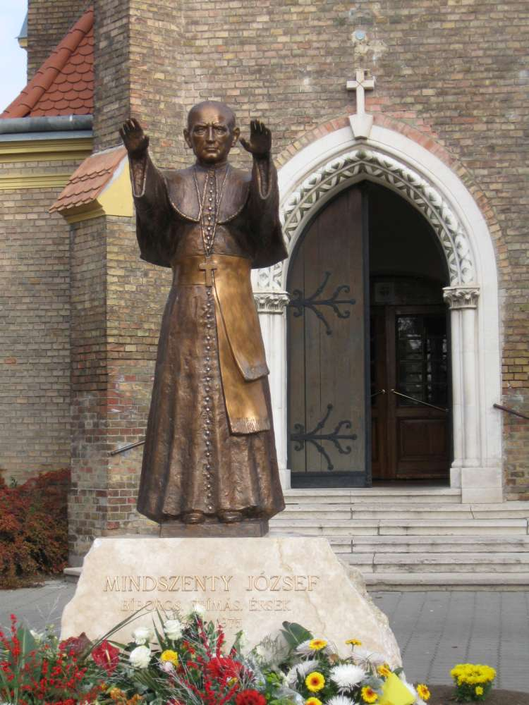 Mindszenty József első budapesti szobra, Budapest, XVI. ker., Templom tér (szobrász: Domonkos Béla, 2009) Állíttatta a „Hittel a nemzetért” alapítvány 2009-ben, október 26-án 220 centiméter magas bronzszobor, amely egy 80 centiméteres süttői mészkő alapon áll. A szobor áldást emelő kézzel ábrázolja Mindszenty Józsefet.